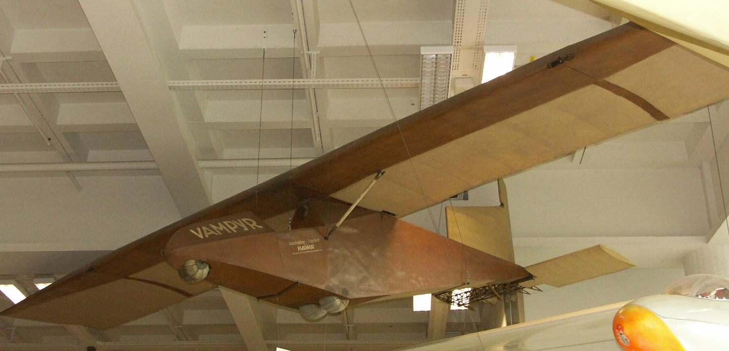 Photo by Jean-Patrick Donzey in Deutsches Museum Munich German Glider Vampyr